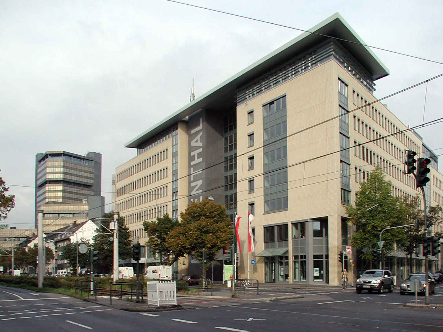 Köln Lindenthal, Lindenthal Bezirksrathaus